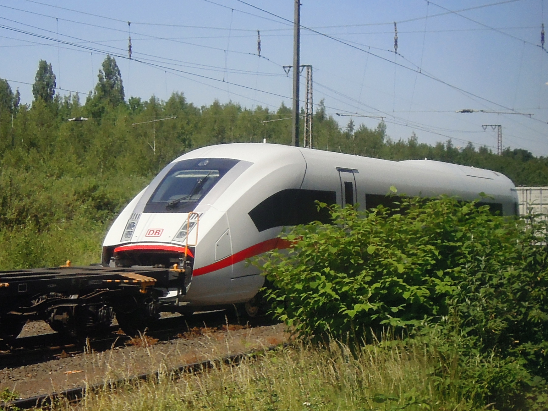 Ein Endwagen des ICx 9004 steht im Juni 2015 bei seiner Überführung nach Wegberg-Wildenrath nahe Rheydt.